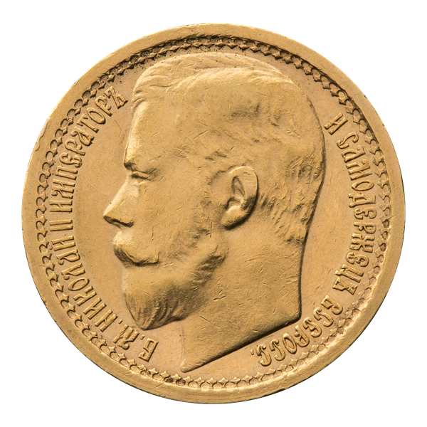 Пятнадцать рублей 1897 г. (аверс). Биткин 347 (R4). Профильный портрет императора, влево. Голова большая. Четыре последние буквы круговой надписи полностью заходят за обрез шеи. Круговая надпись: Б. М.НИКОЛАЙ II ИМПЕРАТОРЪ И САМОДЕРЖЕЦЪ ВСЕРОСС. Зубчатый ободок по краю.